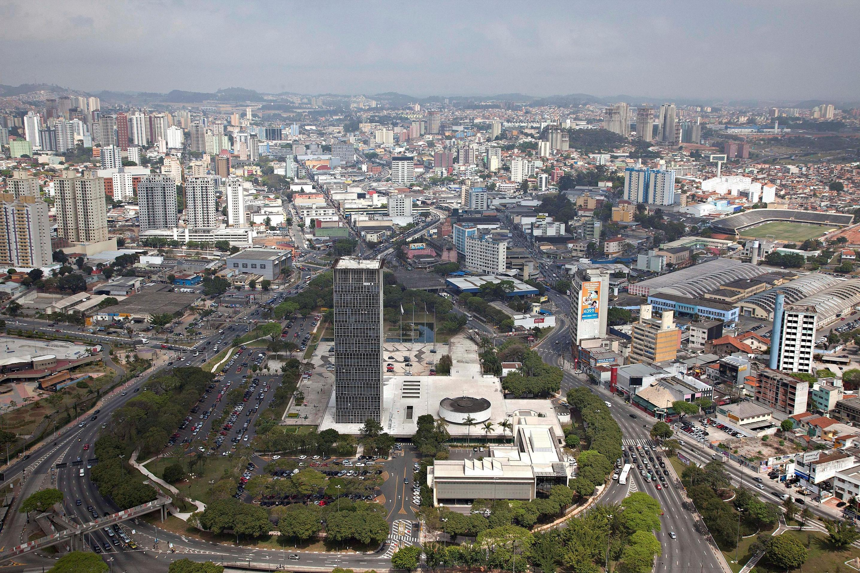 Visão Panorâmica de São Bernardo do Campo